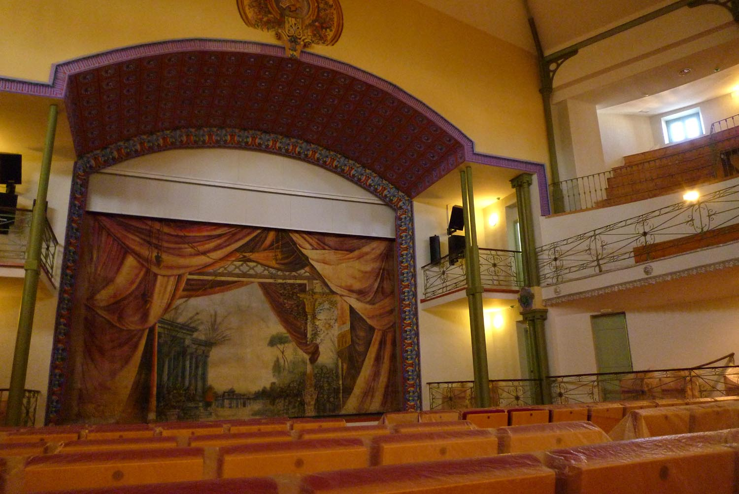 Teatro Apolo de El Algar. Cartagena (España).